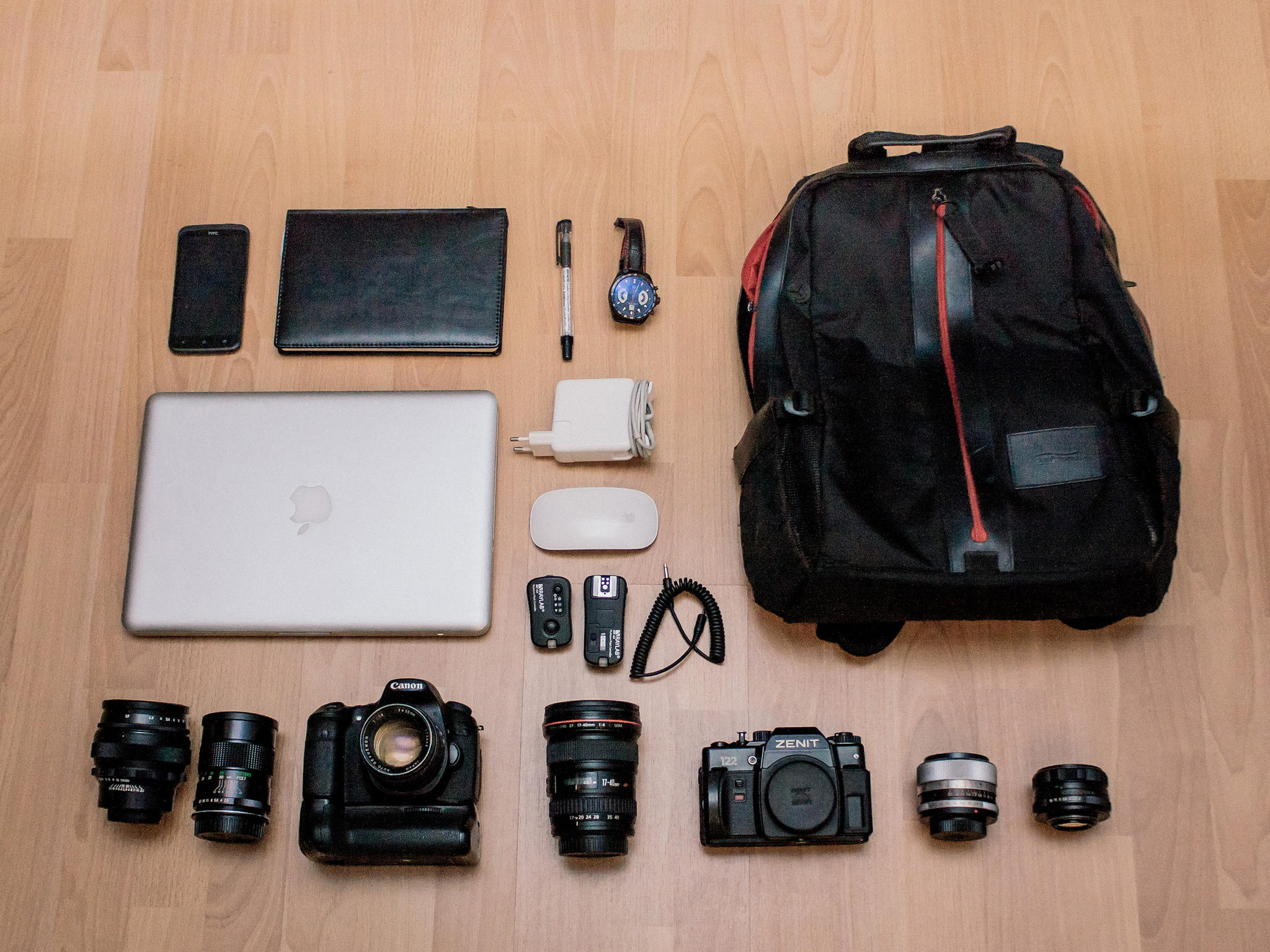 Инструменты профессионального фотографа